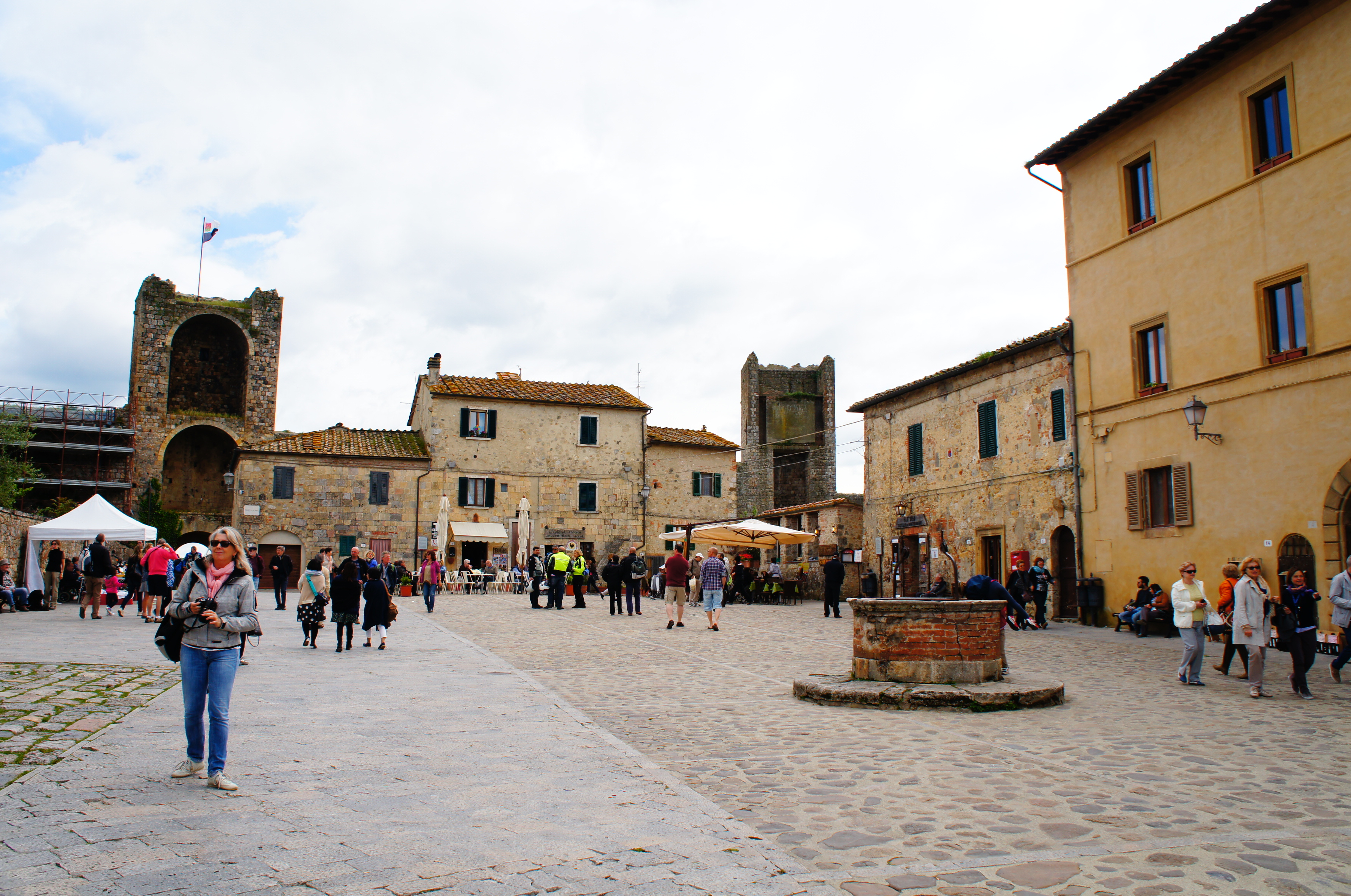 Monteriggioni